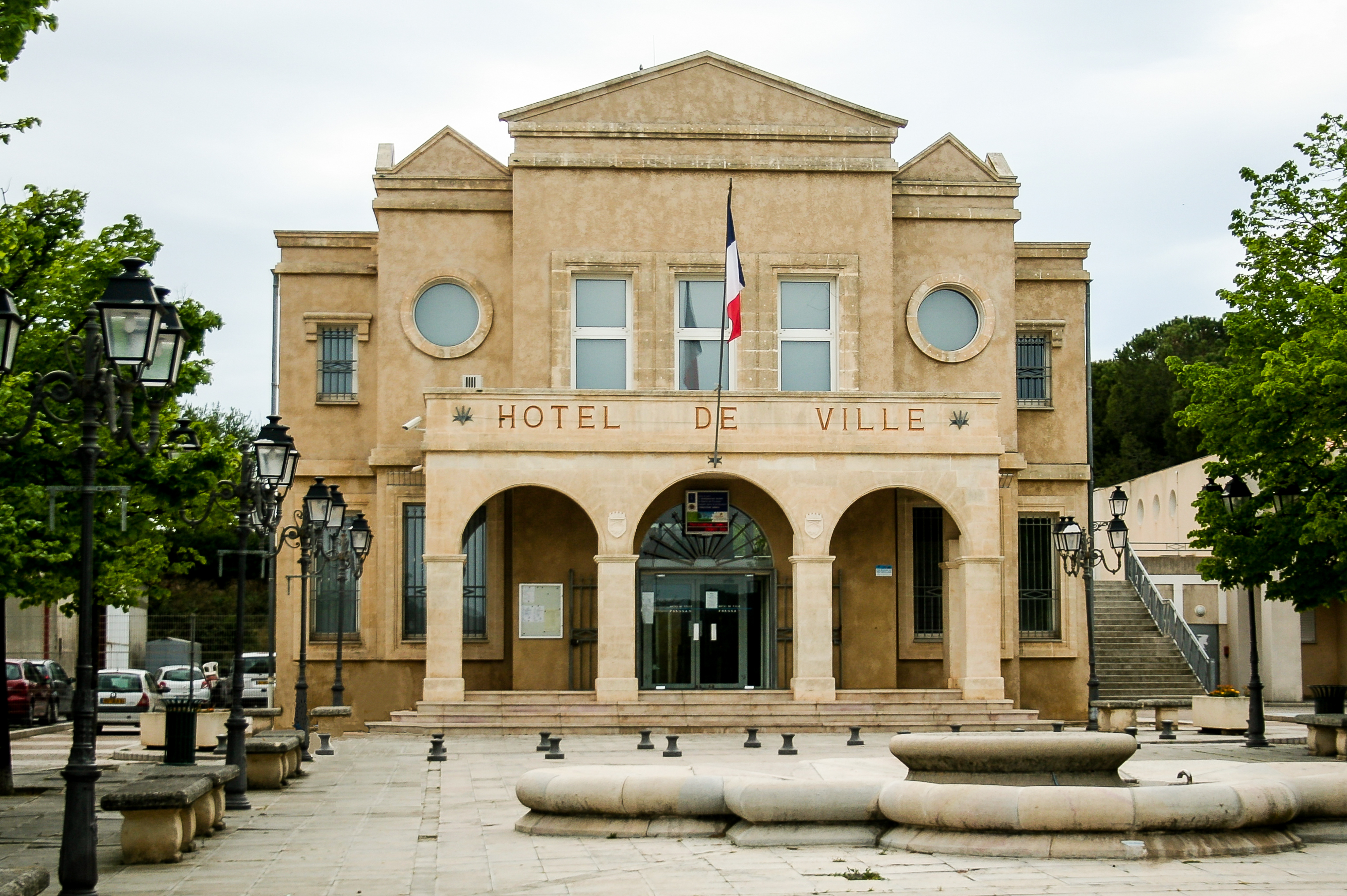 Poussan (Hérault) - mairie